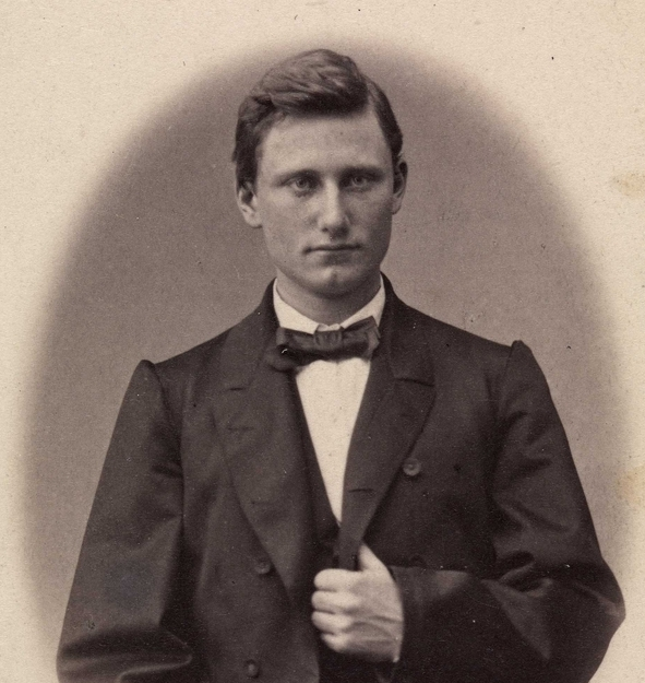 Ludvig Mariboe Benjamin Aubert, portrett, mann, jurist, professor, vignettert sittende halvfigur.